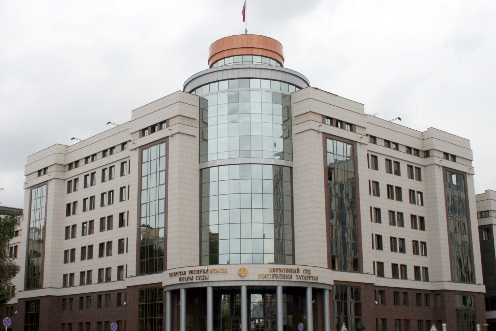 Фотографии Верховного Суда РТ. Фасад здания.